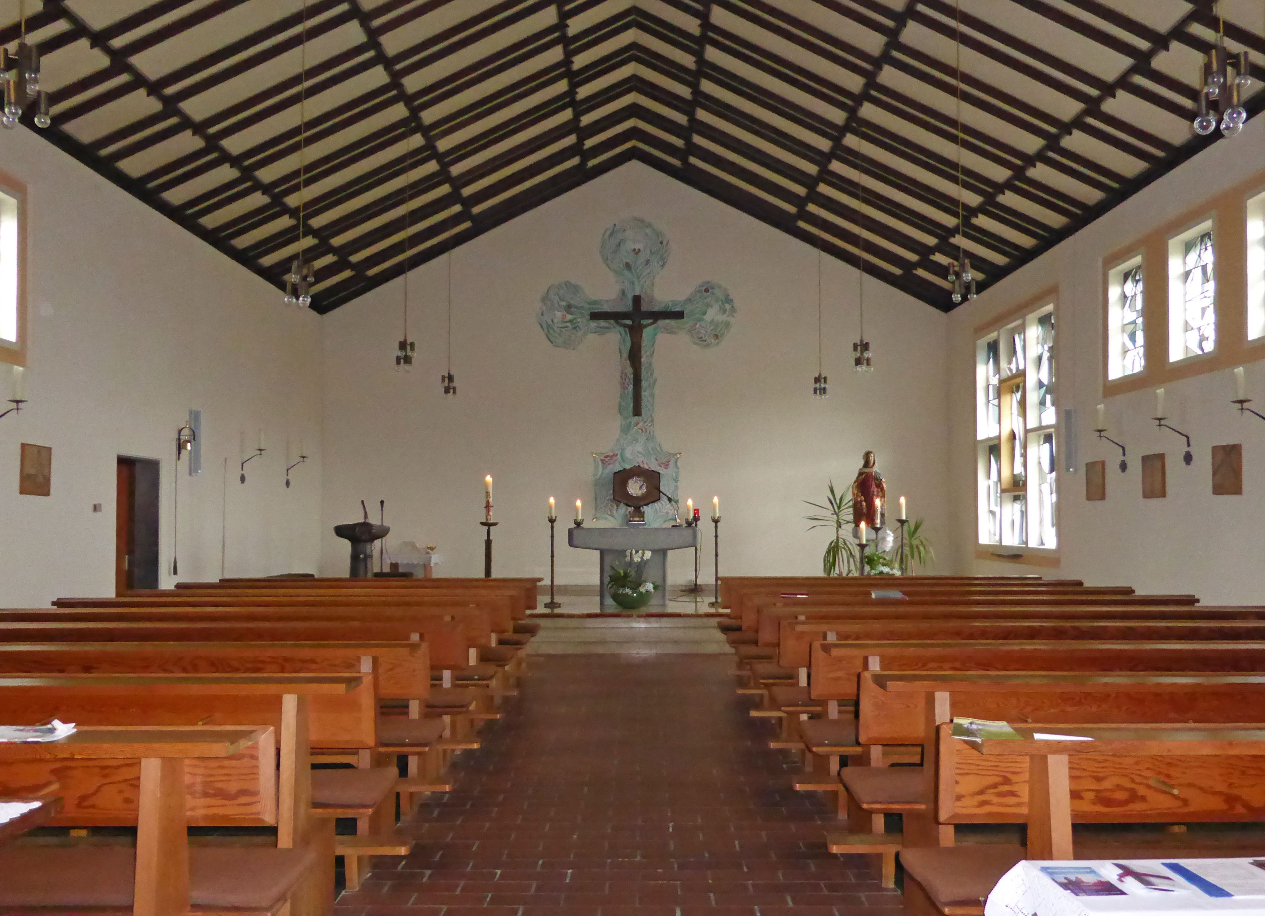 Katholiscvhe St.-Raphael-Kirche in Parsau.